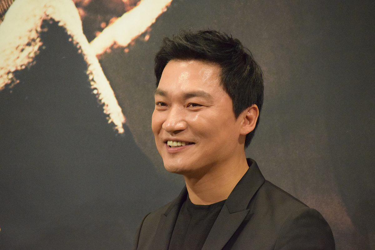 조재윤 OCN오리지널 '구해줘2' 제작발표회 (2019.4.30)